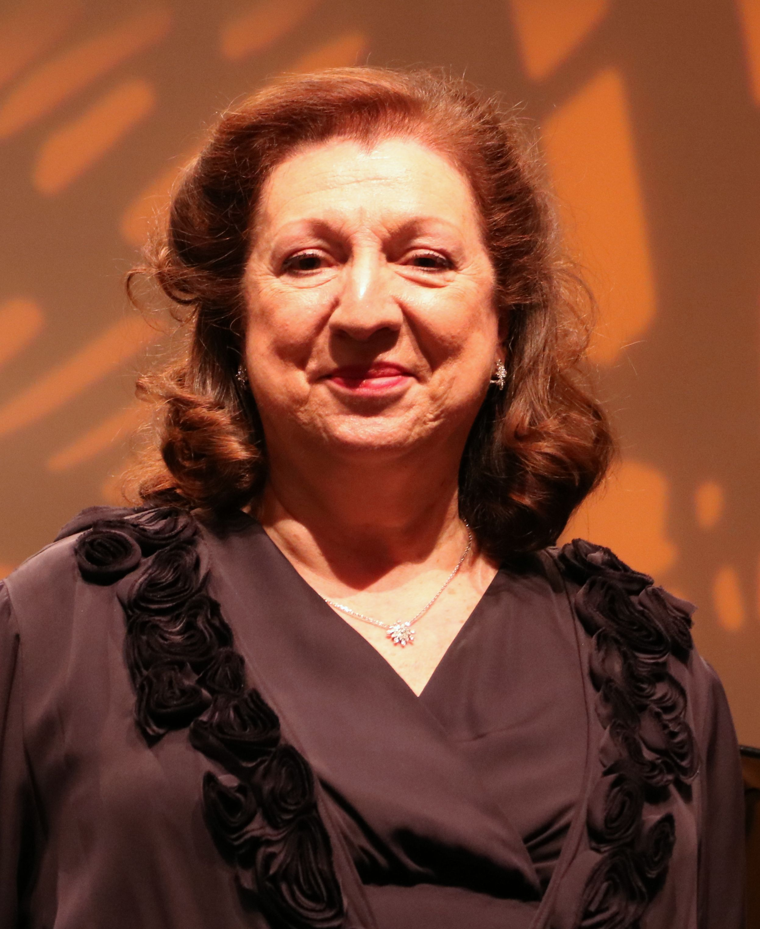 Marie-Catherine Girod, pianiste, La folle Journée 2018, Nantes